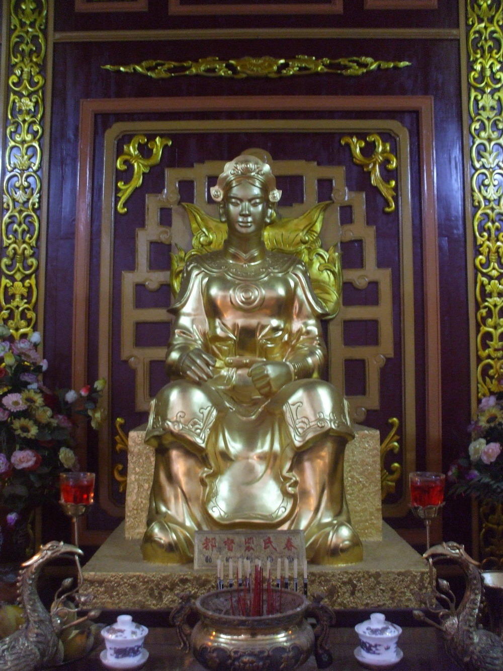 Tượng Đô đốc Bùi Thị Xuân trong Điện thờ Tây Sơn Tam Kiệt (Bảo tàng Quang Trung, Bình Định, Việt Nam)